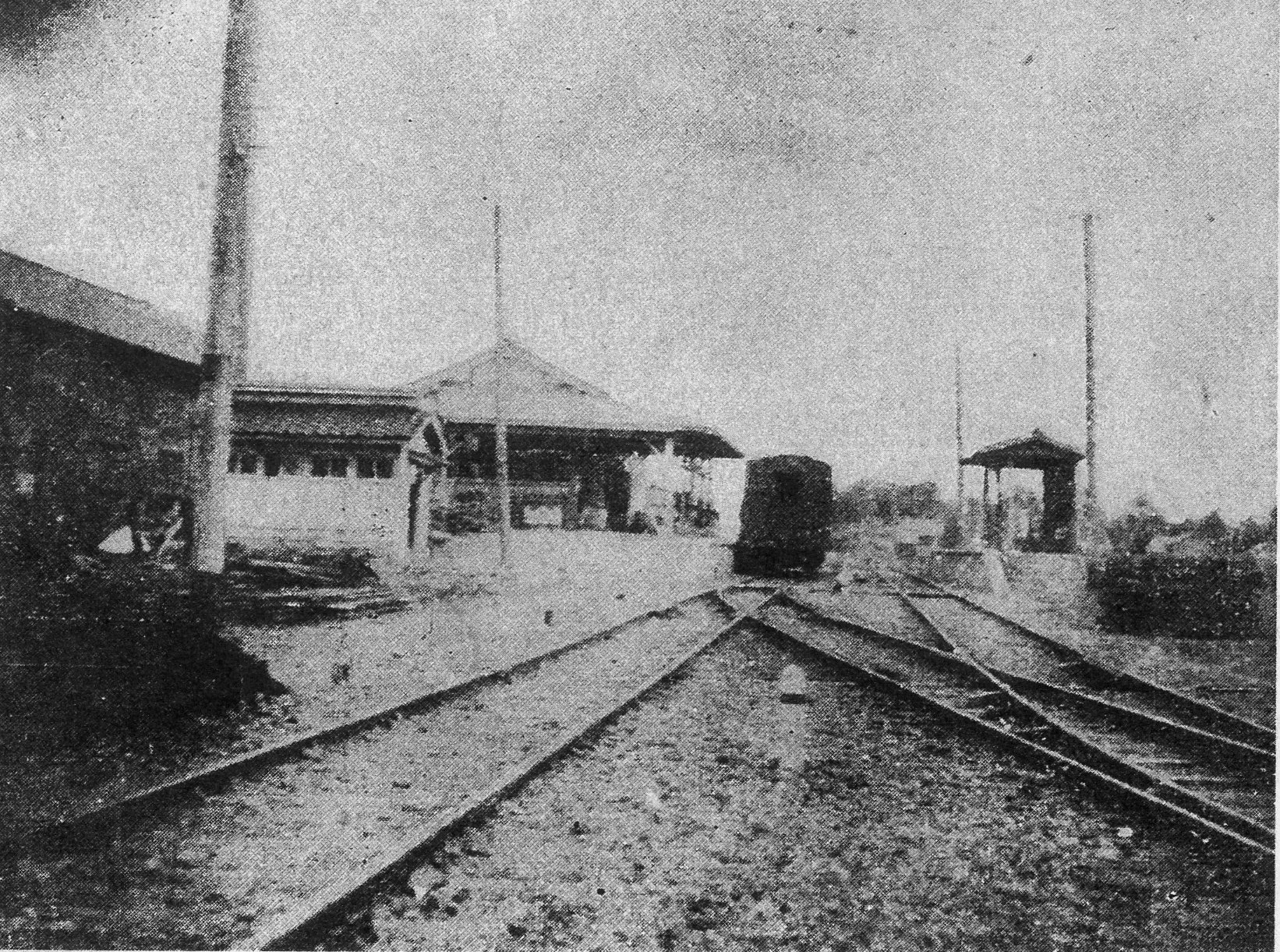 1926年（大正15年）頃の四方駅